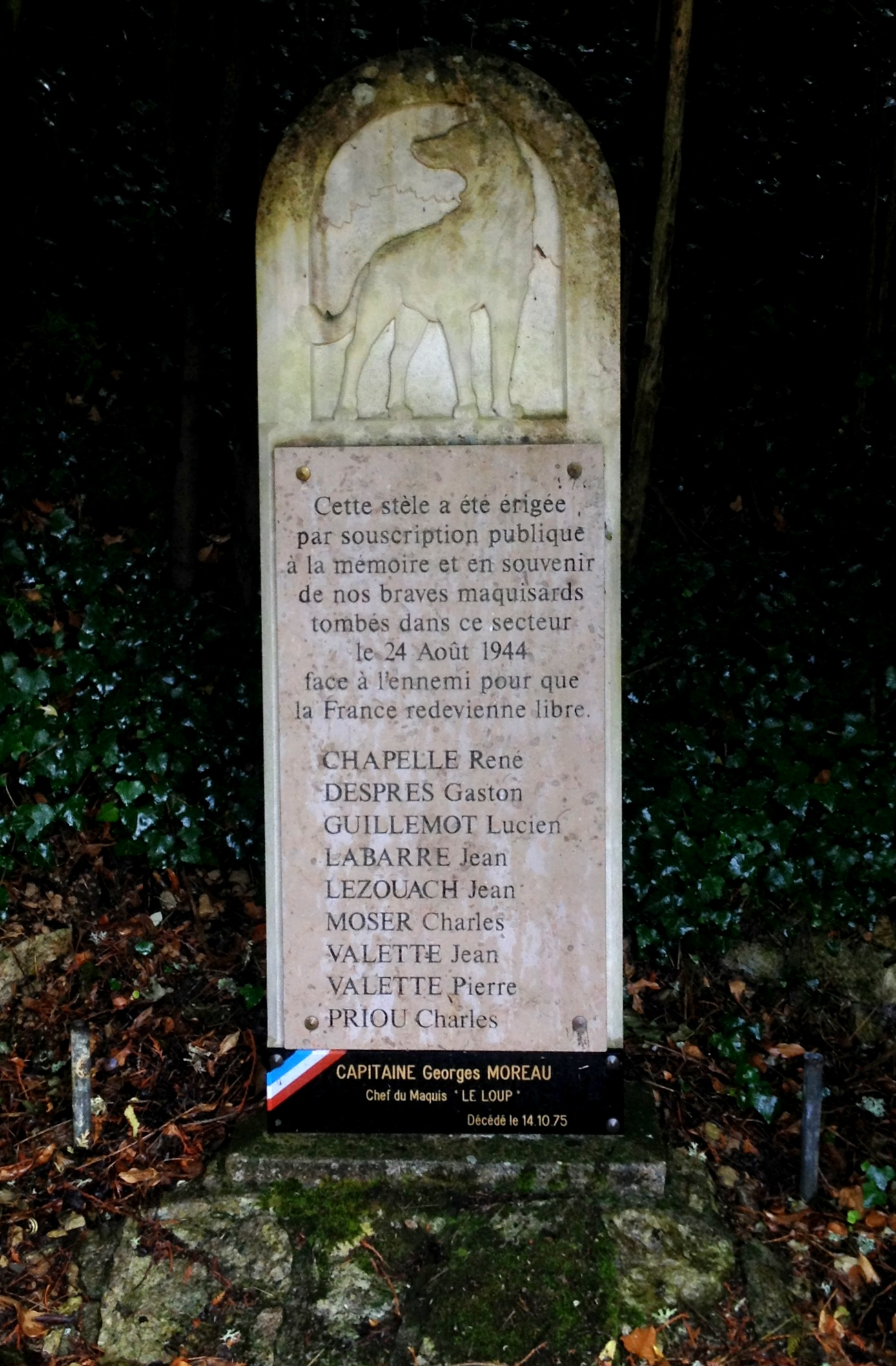 École française du XXe s., Stèle hommage au maquis du Loup à Vézelay. « À la mémoire de nos braves maquisards tombés dans ce secteur le 24 août 1944 face à l'ennemi pour que la France redevienne libre : Chapelle René Desprès Gaston Guilleminot Lucien Labarre Jean Lezouach Jean Moser Charles Valette Jean Valette Pierre Priou Charles Capitaine Georges Moreau « chef du Maquis le Loup » décédé le 10 octobre 1975. »